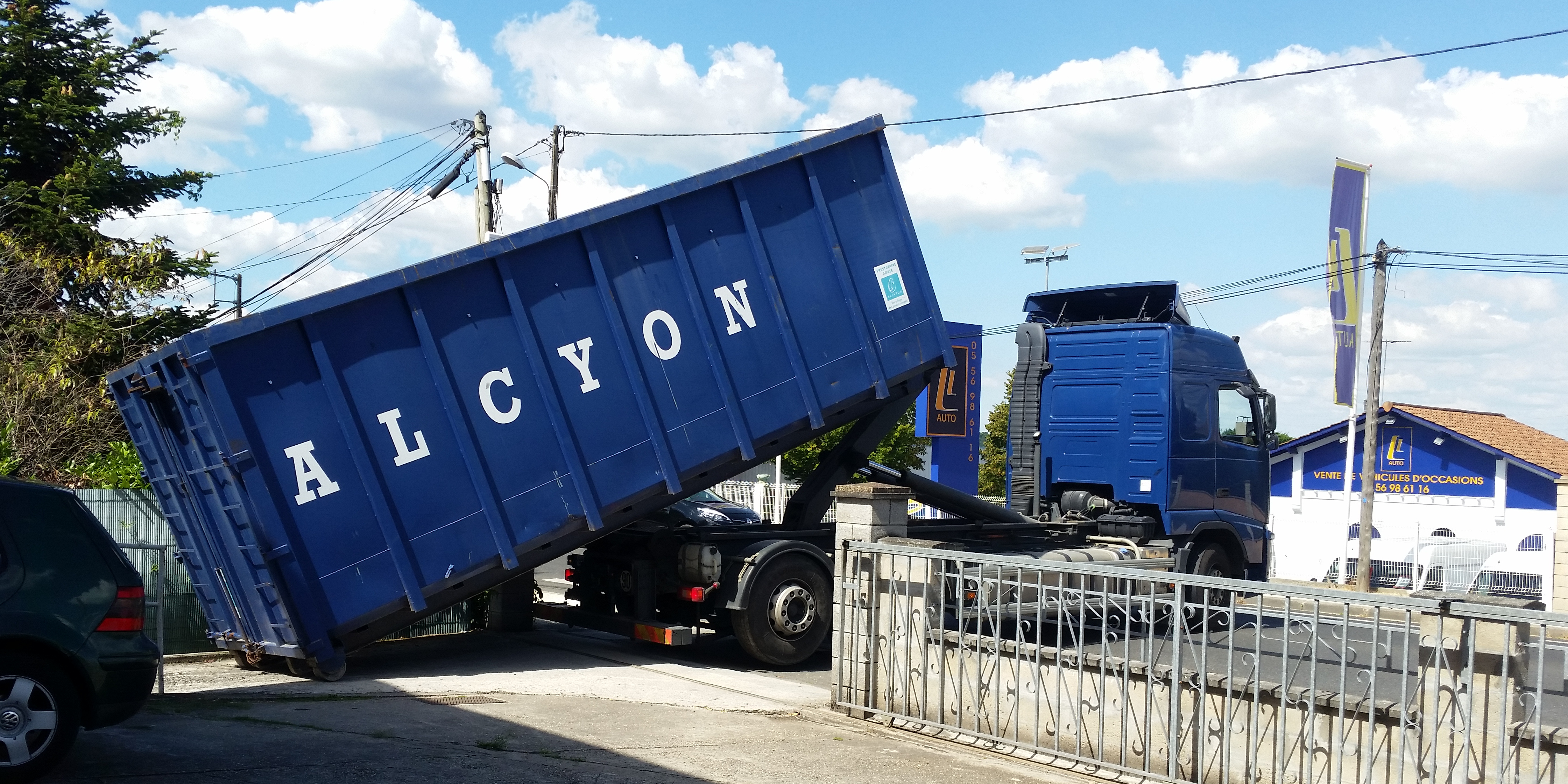 Déchargement d'une benne conteneur